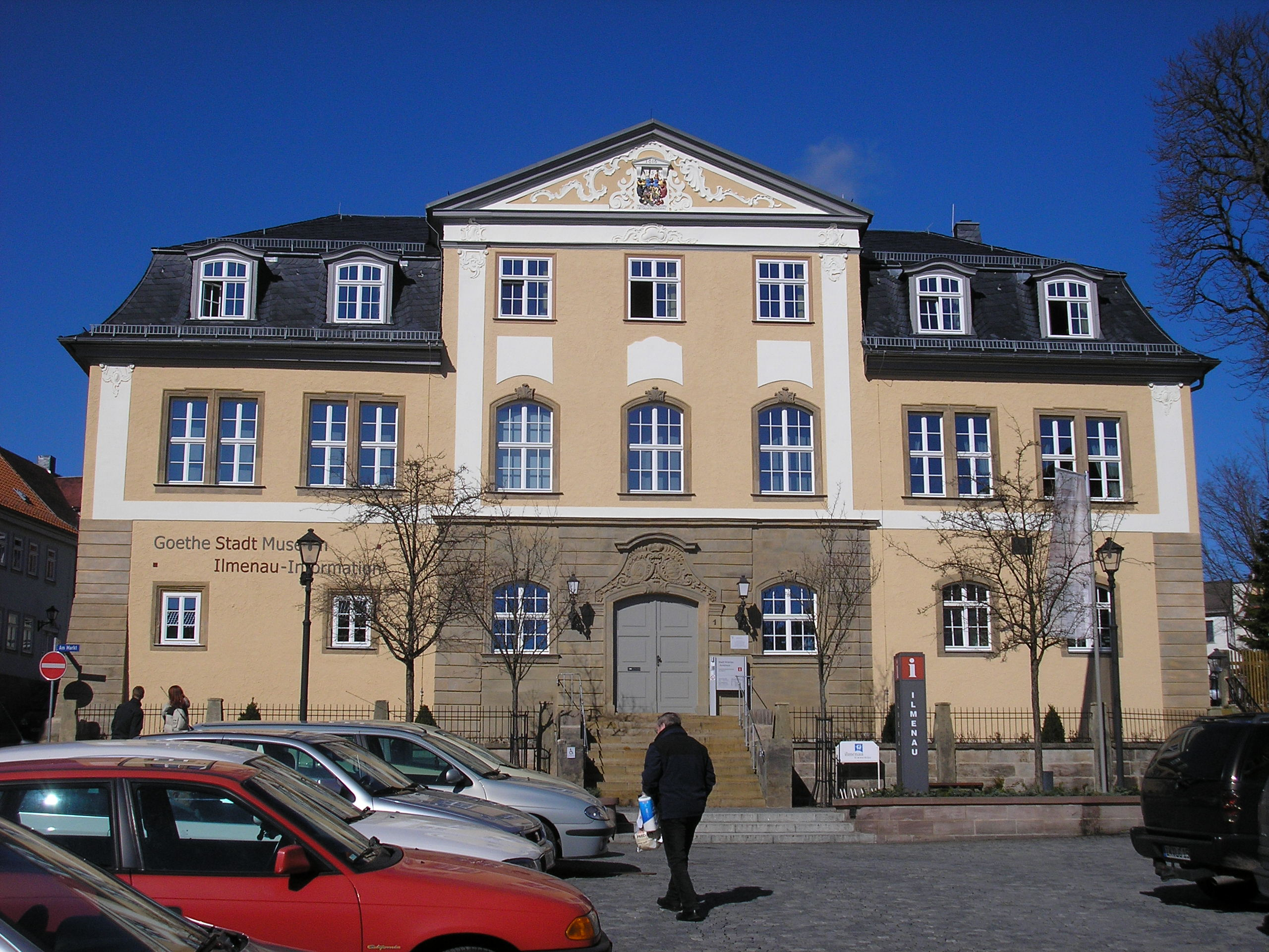 in Ilmenau (Thüringen).